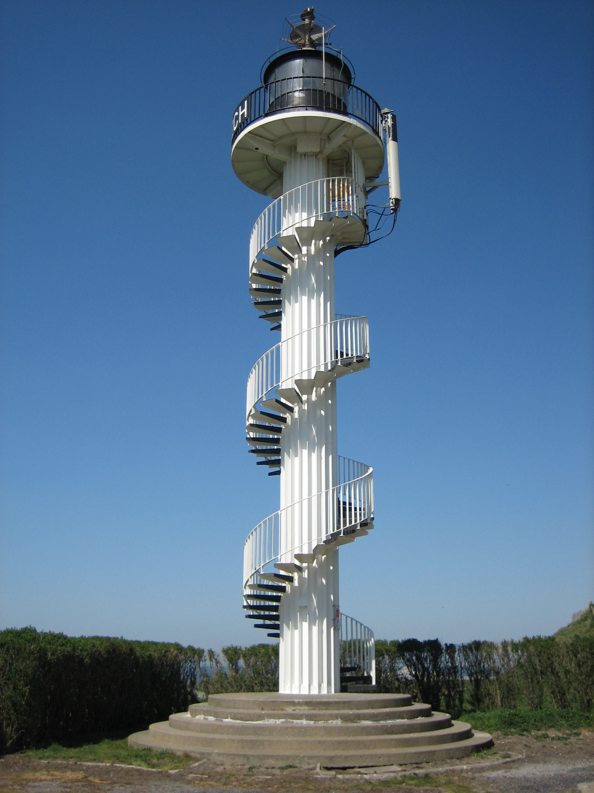 Phare situé sur la pointe d'Alprech au Sud de la ville de Le Portel. Destiné à signaler le coté Sud du port de Boulogne sur Mer. Mise en service en 1963. Automatisé en 1977.